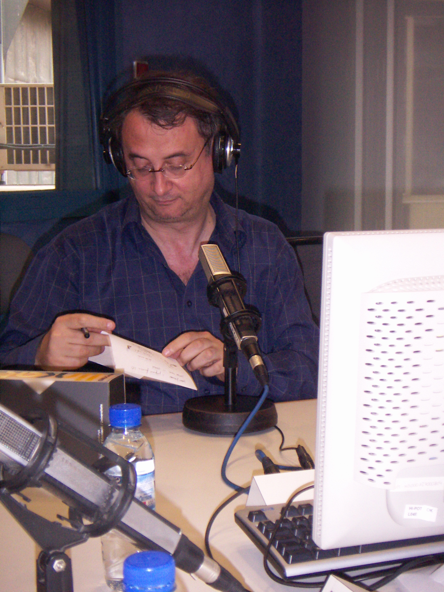 Vicent Partal enregistran l'anunci de la Marató Viquipèdia en la promo del programa l'Internauta del 19/05/07